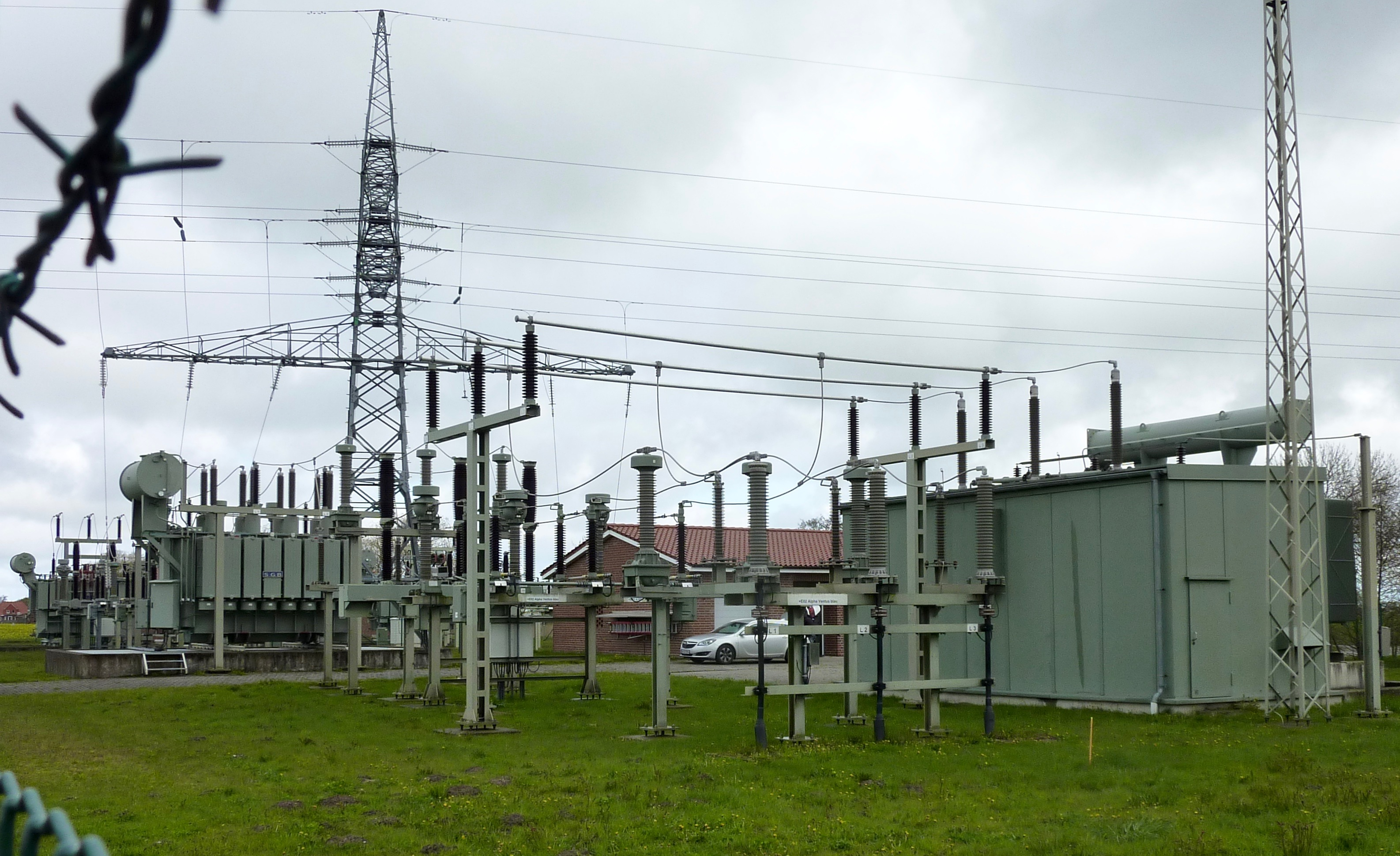 Einspeisung des Offshore-Windparks alpha ventus in das öffentliche Stromnetz im Umspannwerk Hagermarsch; vorne Übergabestelle des 110-kV-Erdkabels, rechts der Erreger-, links der Serienteil des Phasenschiebertransformators, hinten Abzweigmast Nr. 25a der 110-kV-Freileitung